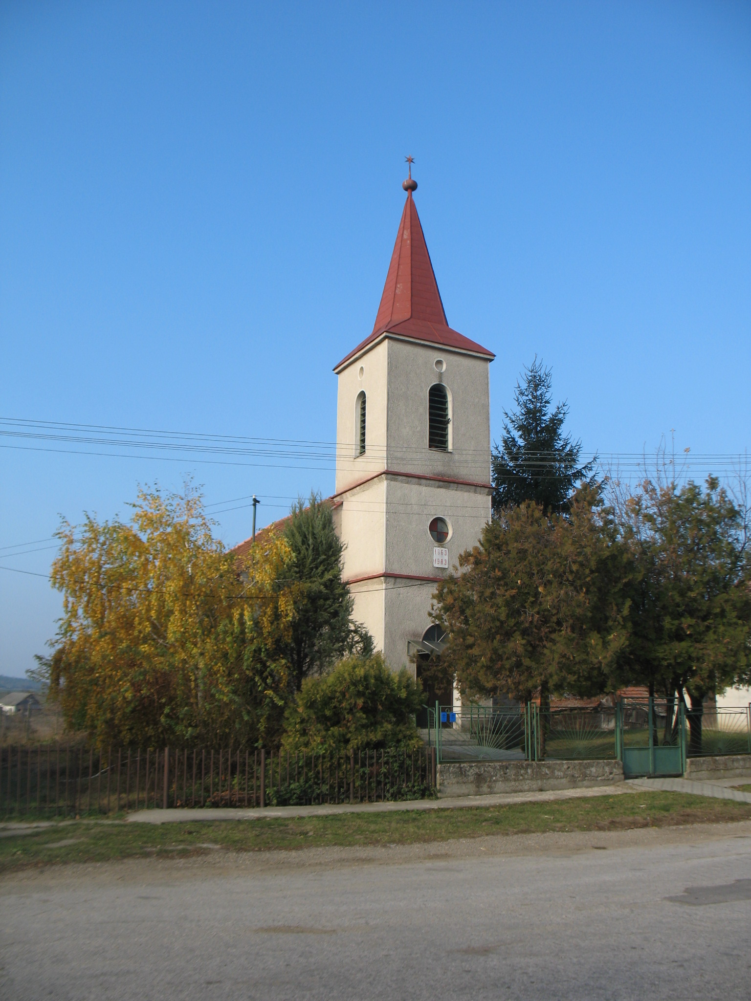 Barsbese temploma